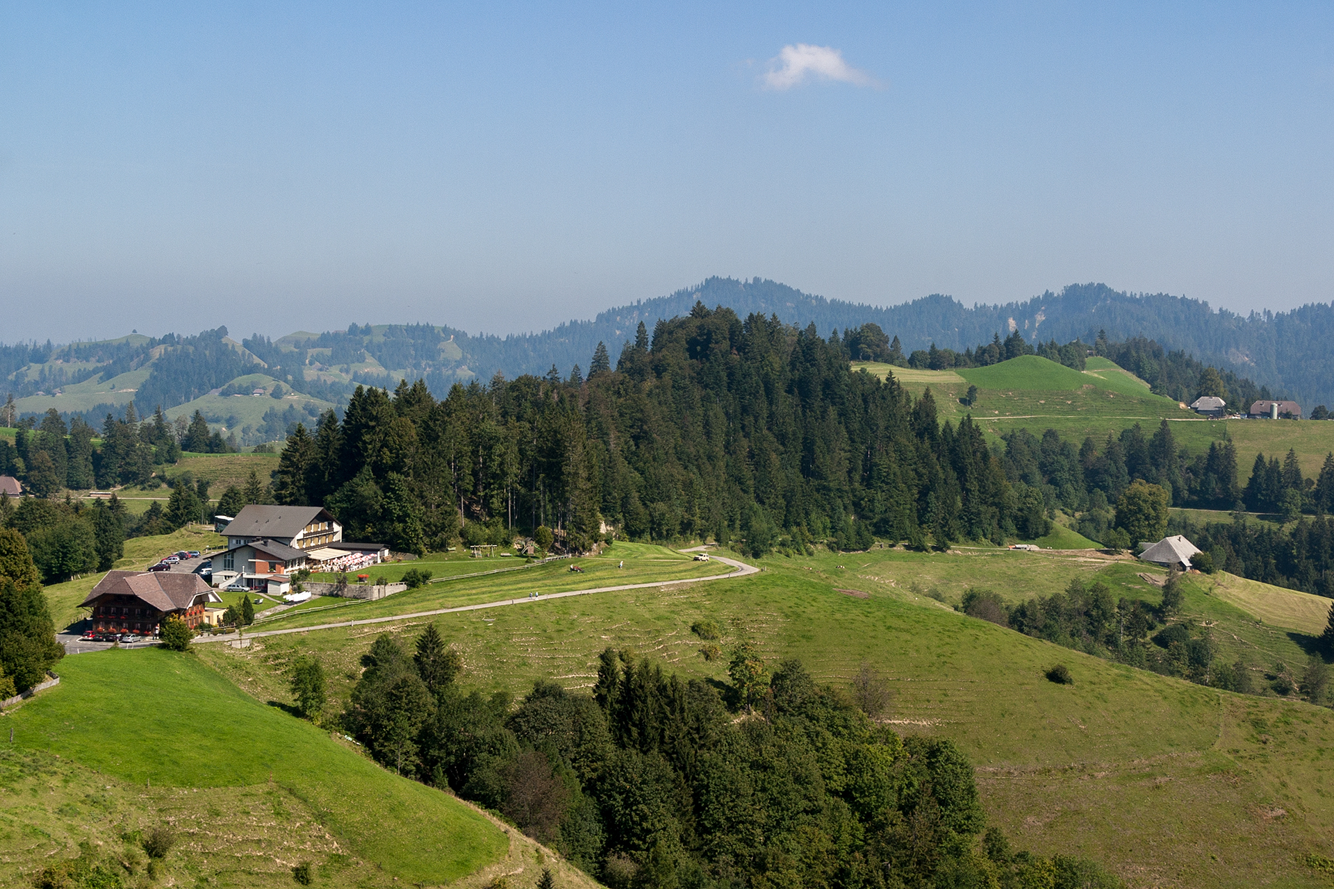 Lüderenalp (BE)